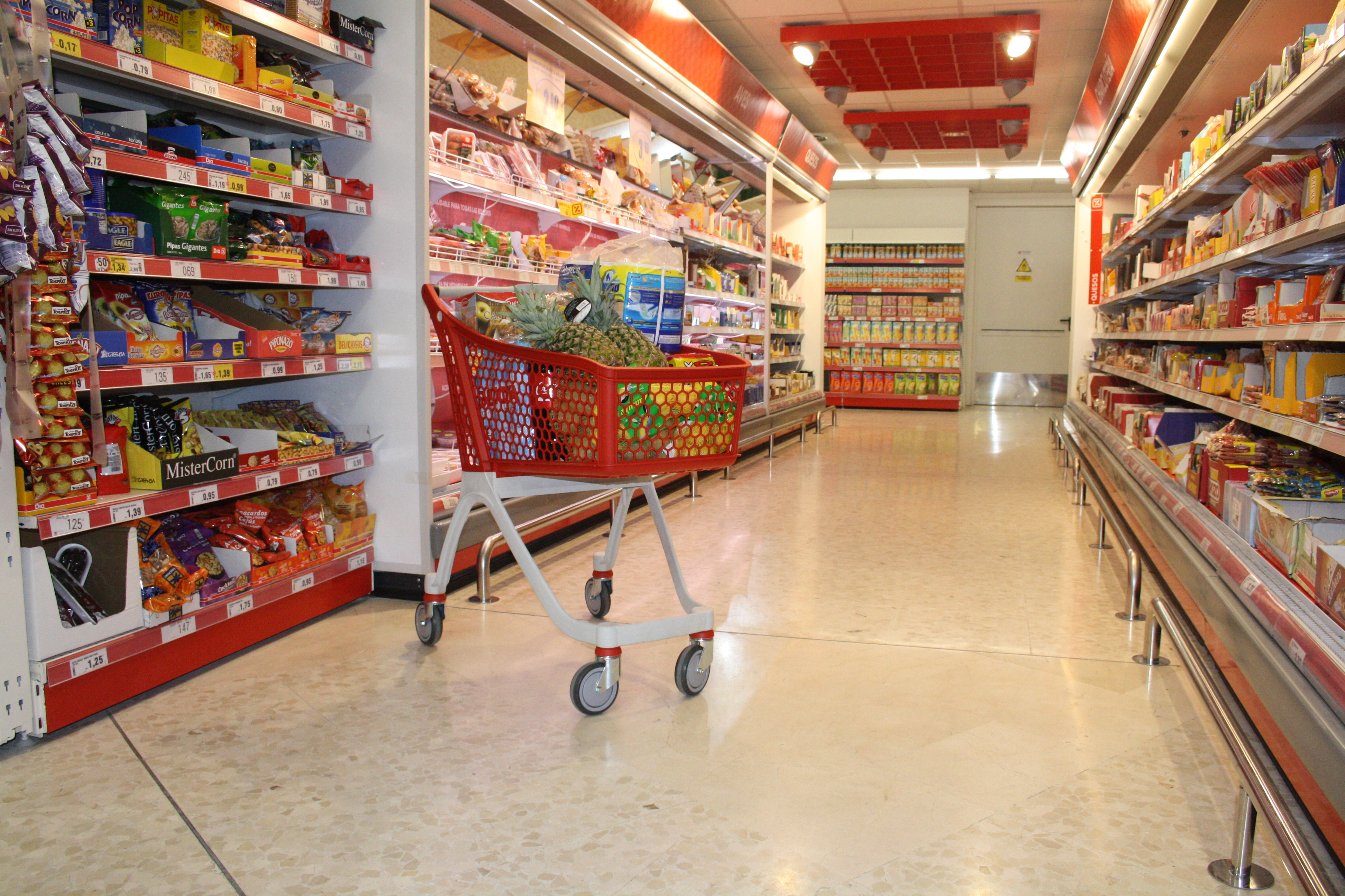 Carro de autoservicio de plástico en un supermercado Dia, en Valencia.